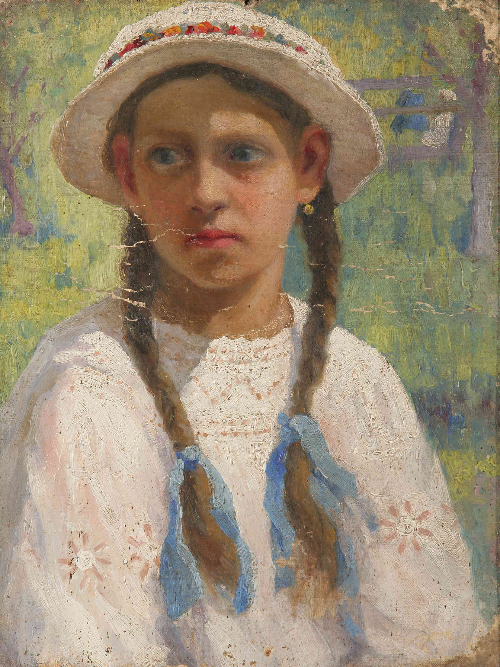 Дзяўчынка ў капелюшы. Южык Павел, 1930-я гг. Палатно, алей. 35,8×26,8 см. Смаргонскі гісторыка-краязнаўчы музей